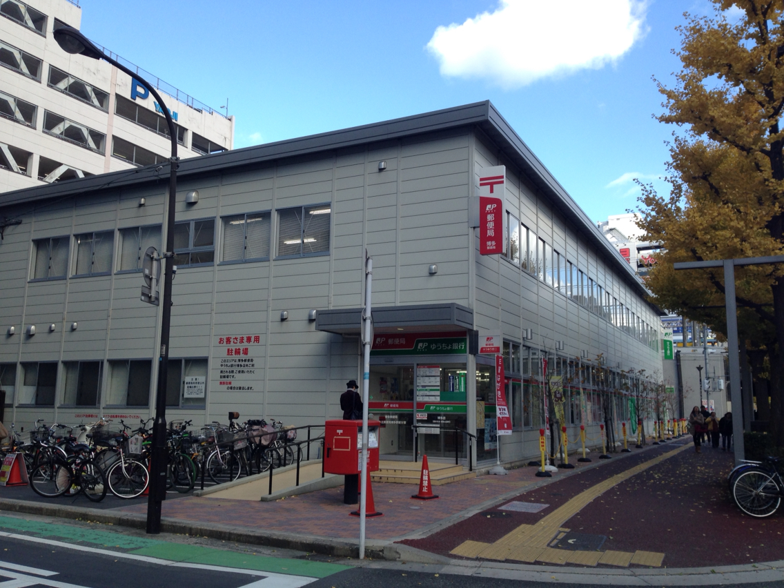 博多郵便局 仮店舗